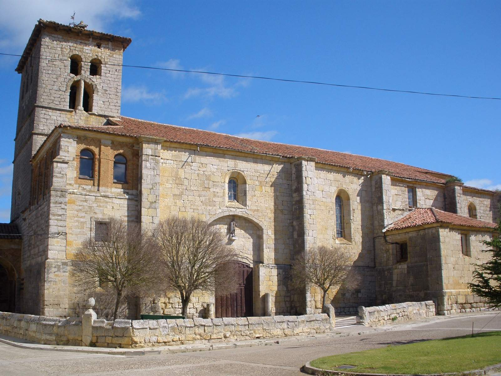 Iglesia de San Miguel (Piña de Campos, Palencia)